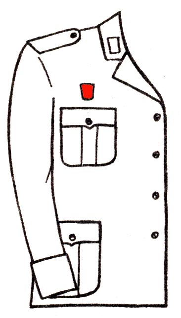 Trageweise der militär. Bestenabzeichen der DDR